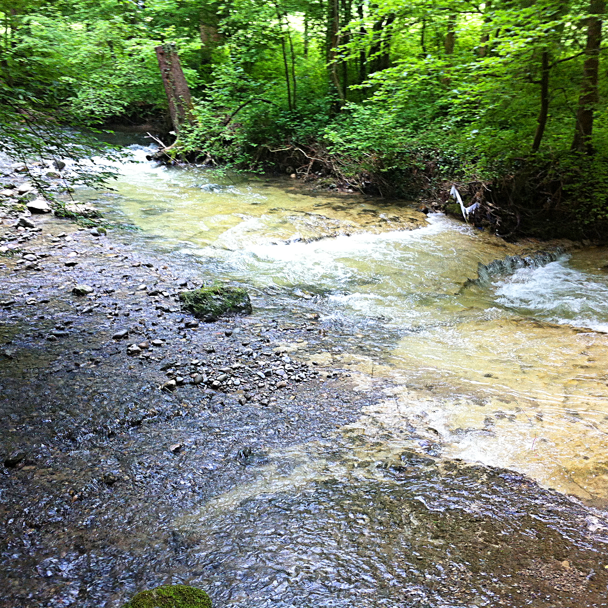 Reppisch bei der Einmündung des Stoffelbachs, Dietikon